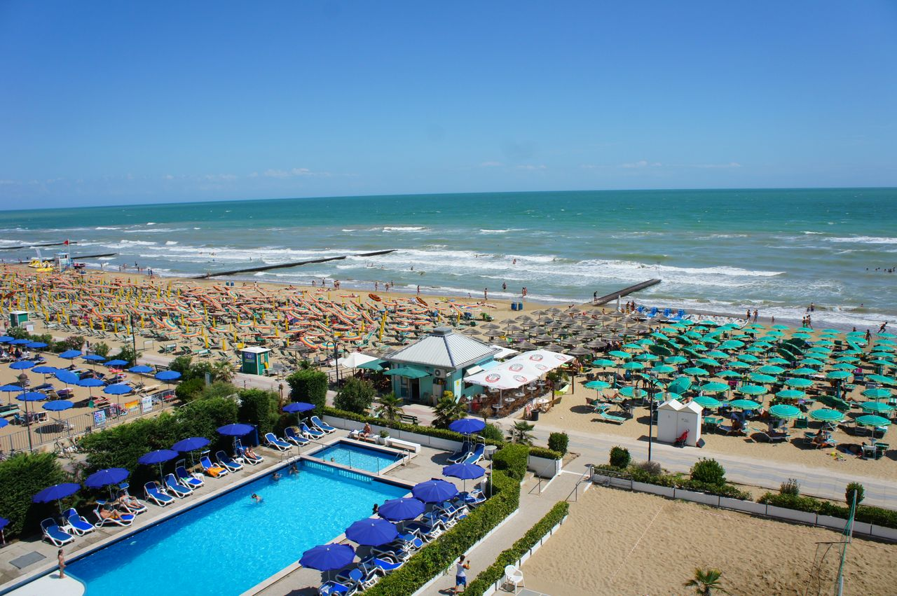 Lido de Jesolo